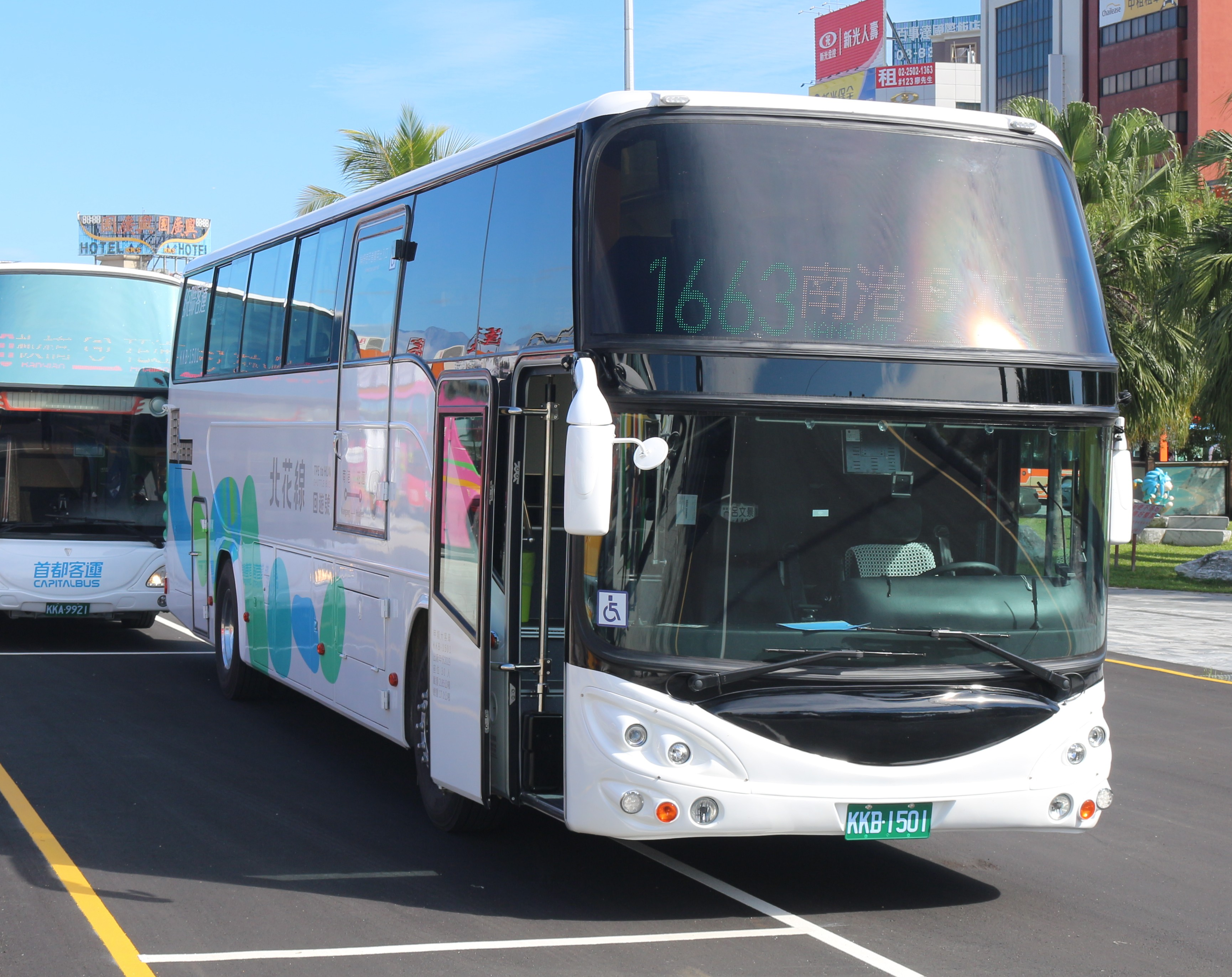 統聯客運SCANIA K400IB4X2NB KKB-1501 1663